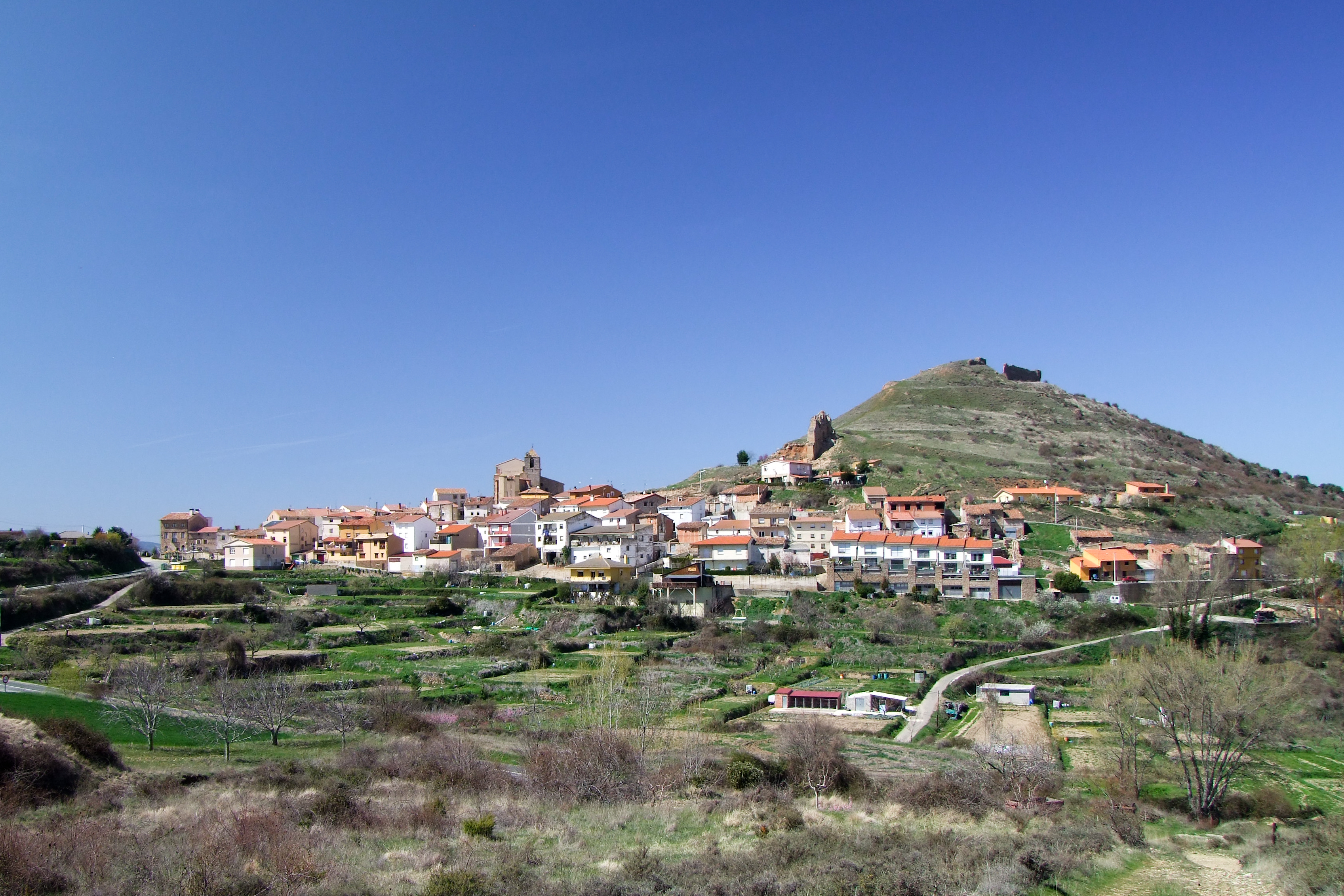 La Villa de Ocón, La Rioja - España